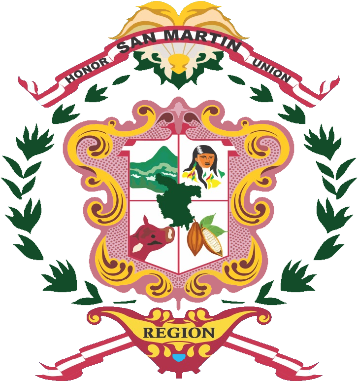 San Martín